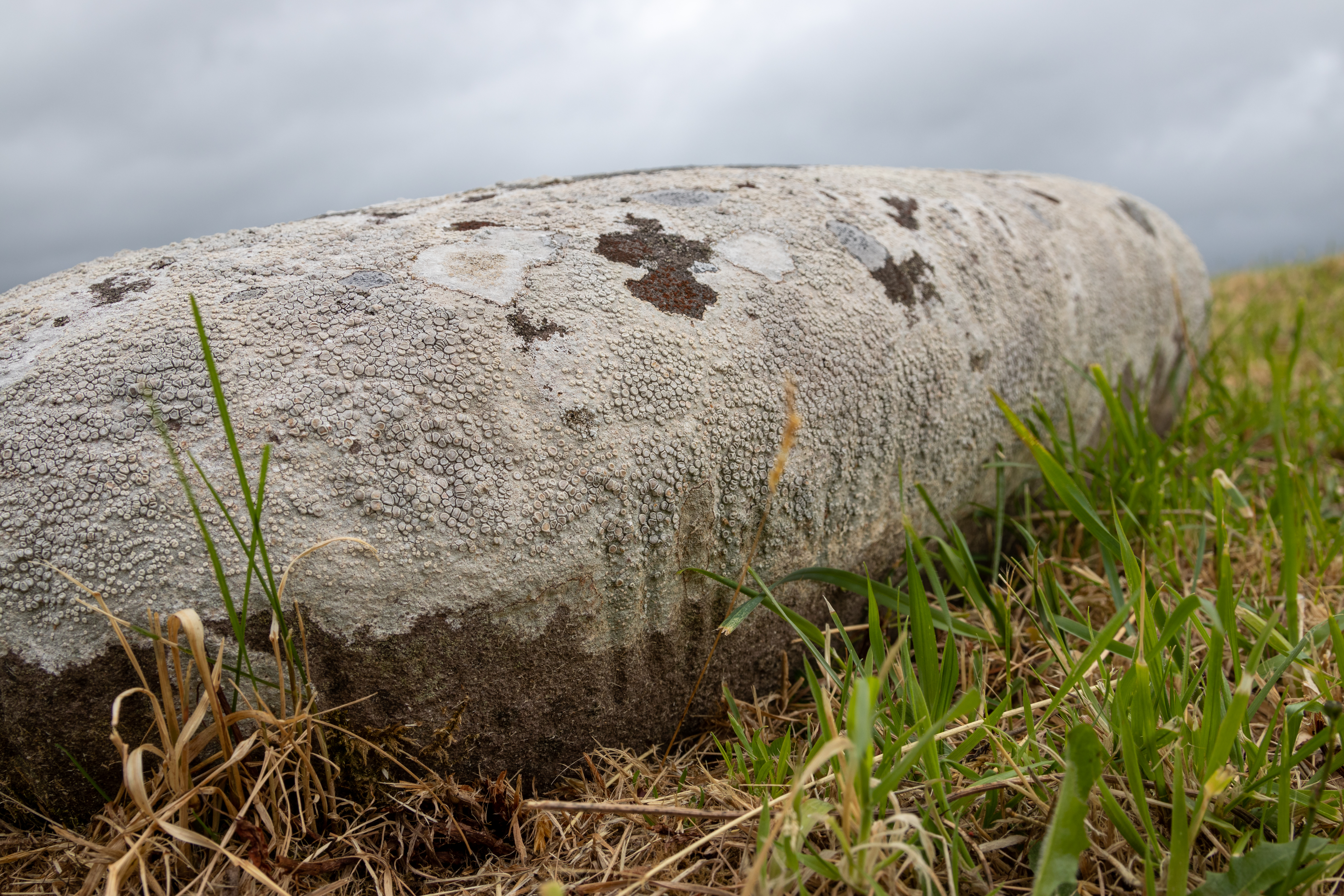 Oghamsteine von Ballintaggart: Ritzungen an einem der Steine